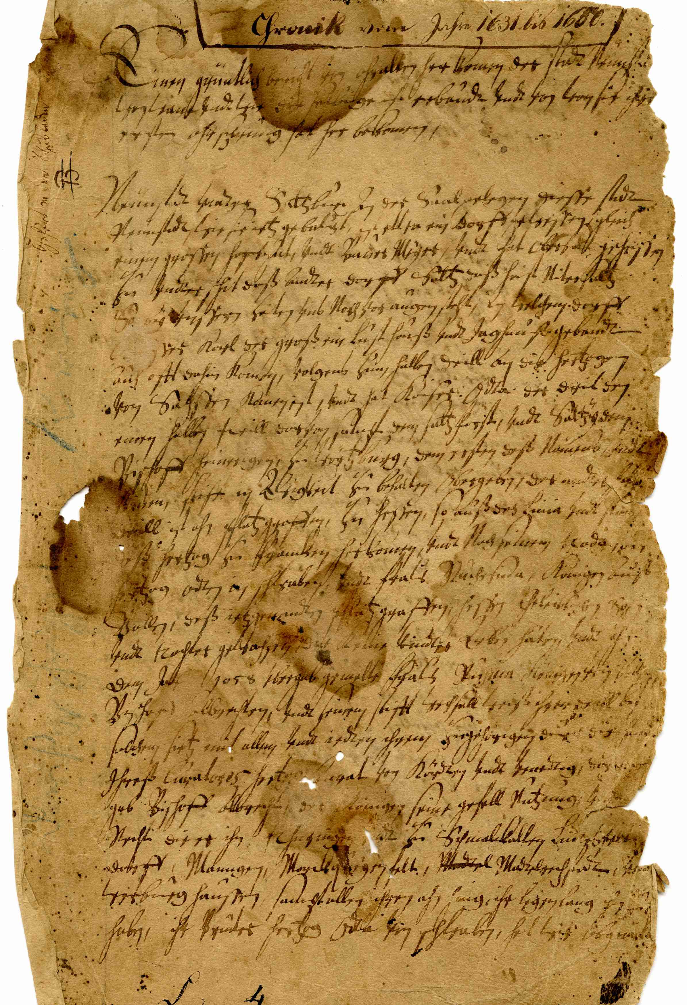 Titelblatt der Chronik des Bad Neustäder Ratsherren Valetin Herr aus dem Jahre 1651